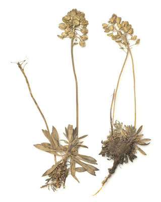 Teesdaliopsis conferta (Lag.) Rothm., en fruto, herborizada en Asturias el 25 julio 1978, a 1700 m.